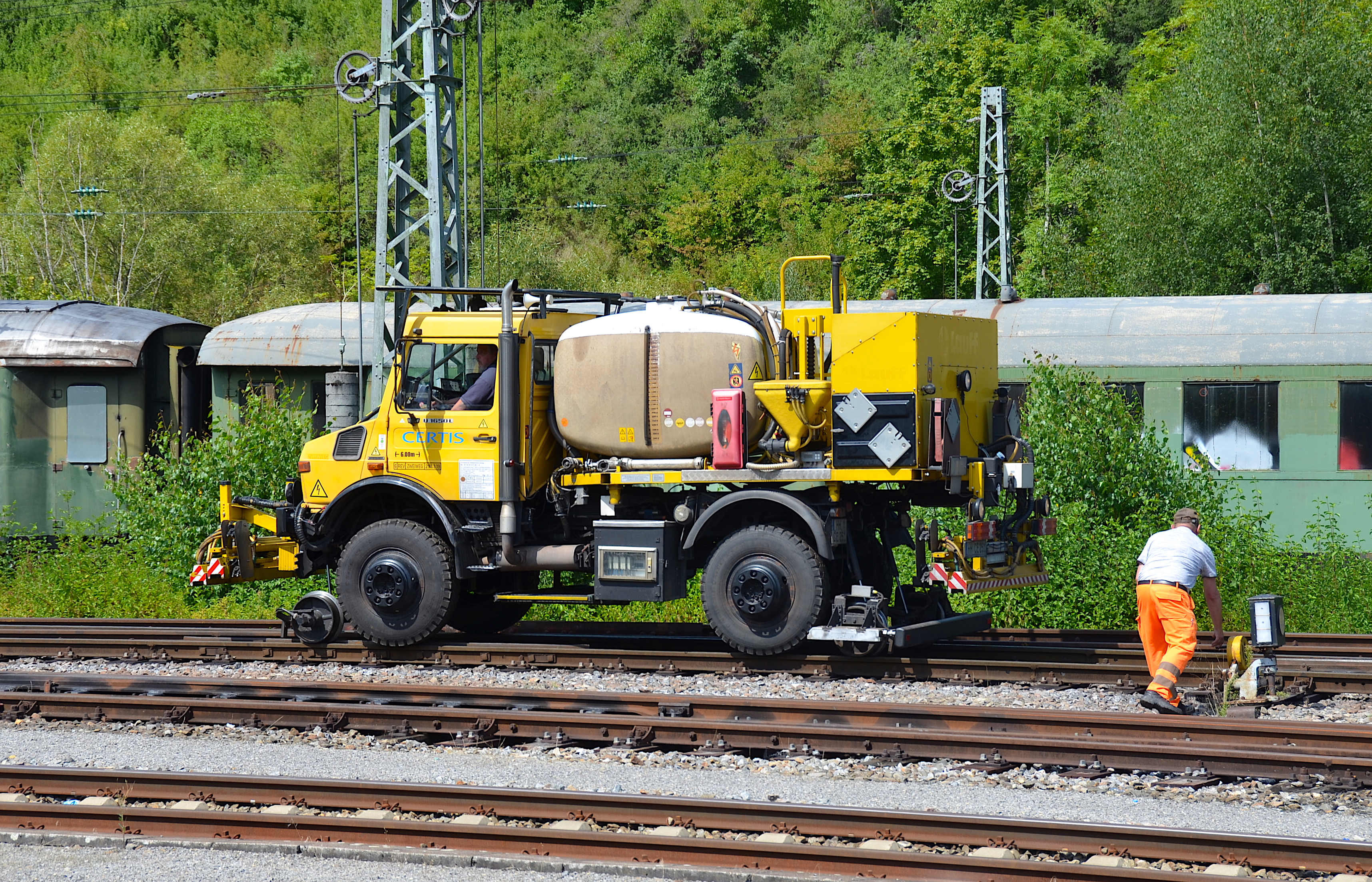 Certis Unimog, Zweiwegefahrzeug zur Vegetatiosbekämpfung (Bahnhof Rottweil)